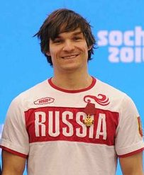 Орденом «За заслуги перед Отечеством» четвёртой степени награждён двукратный олимпийский чемпион в сноуборде Виктор Вайлд.